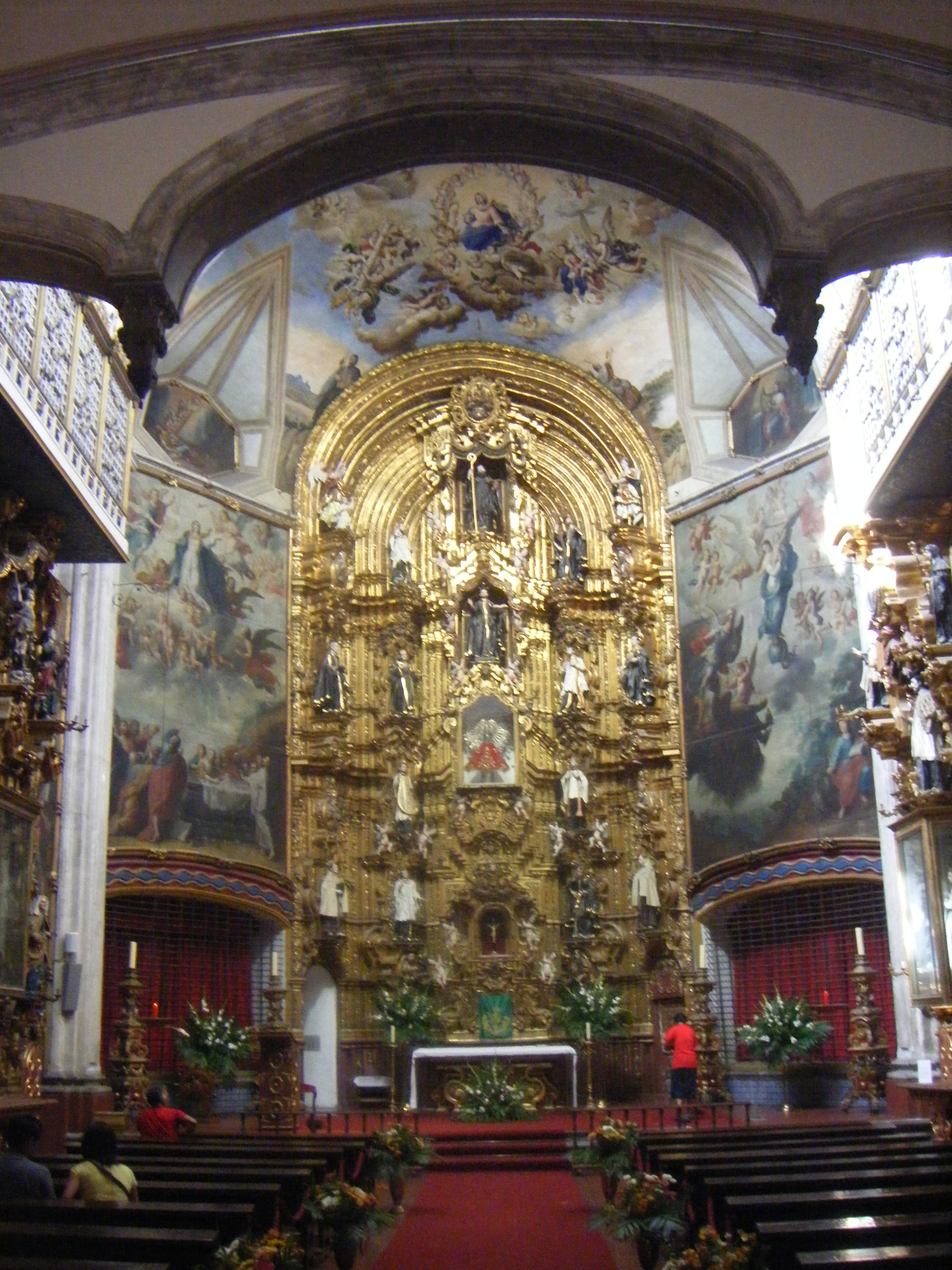 Retablo mayor de la iglesia de Nuestra Señora del Pilar (La Enseñanza). Ciudad de México.